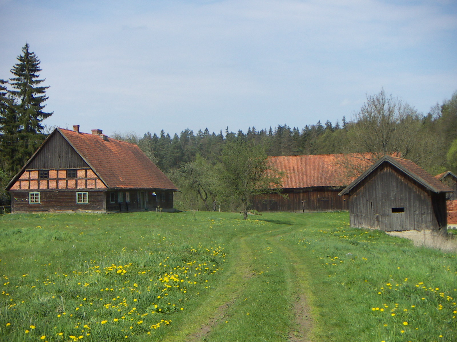 Posiadłość państwa Słomińskich we wsi Dębiny (gmina Wilczęta)